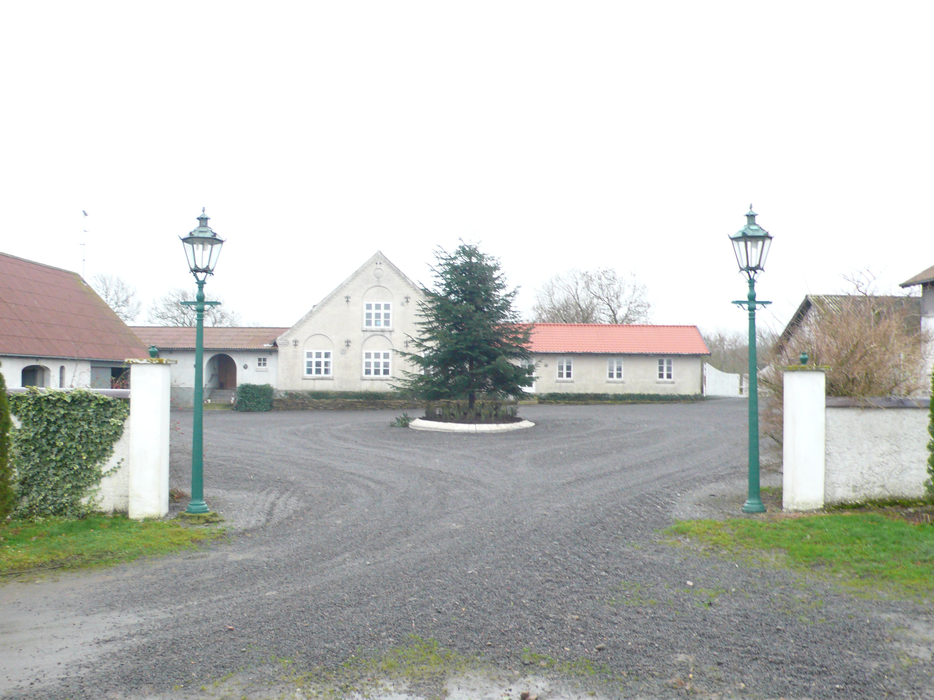 Store Hallegård, Olsker.